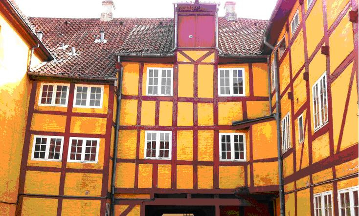 Jørgen Olufsens købmandsgård - baggården